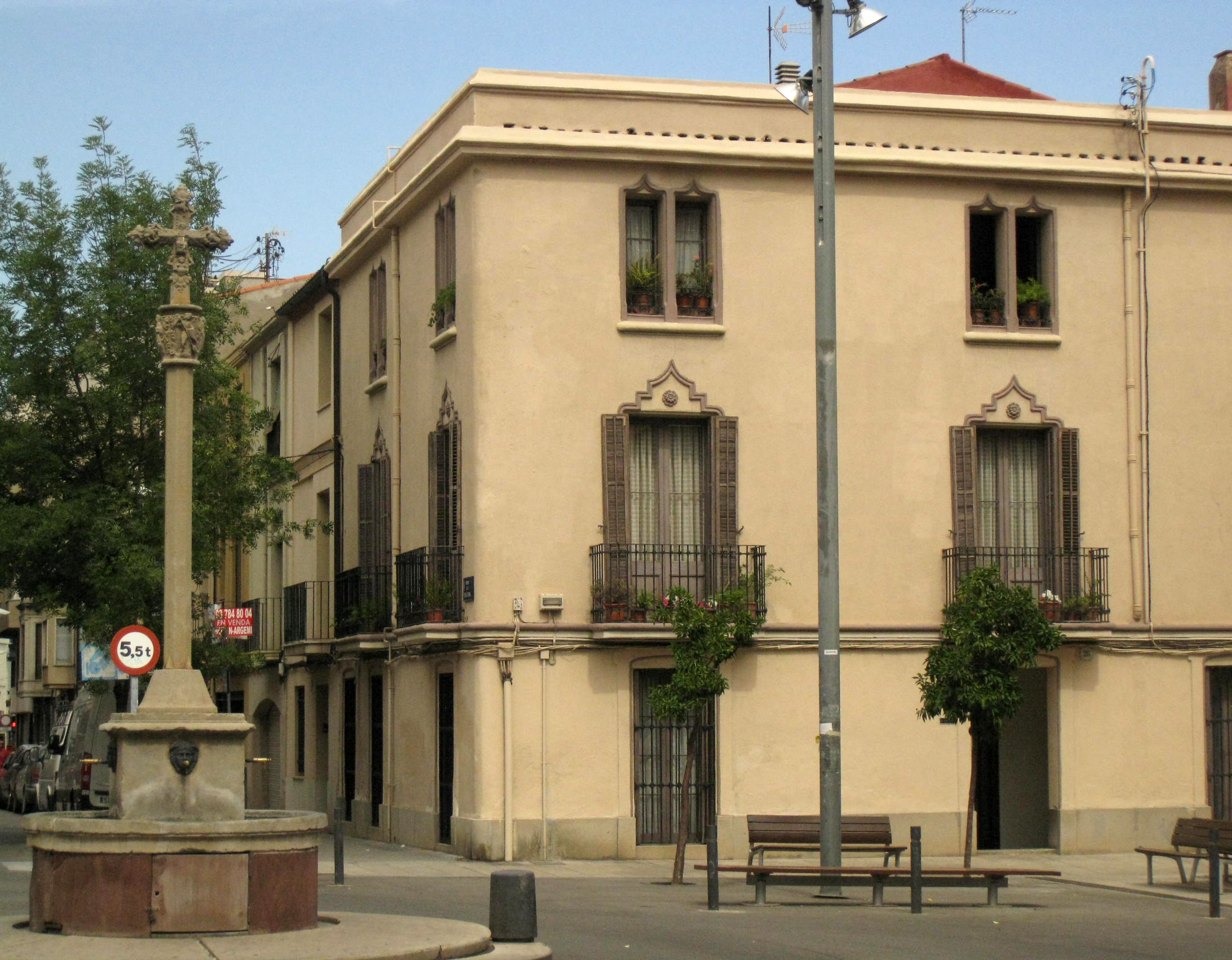 Casa Josep Arias, al carrer de la Creu Gran núm. 26 (Terrassa). Edifici eclèctic de mitjan segle XIX.